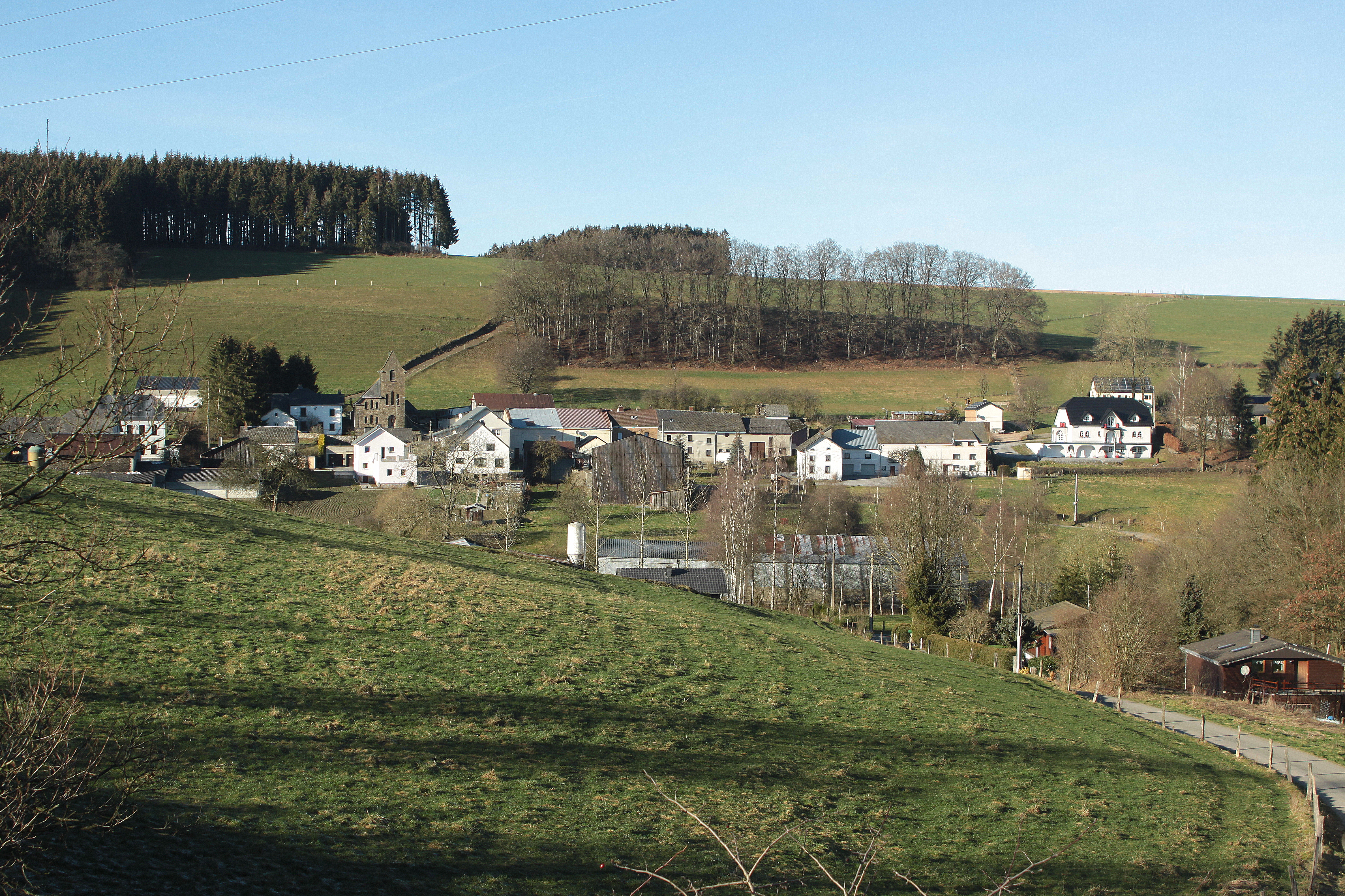 Lengeler vun der Vennbunn aus gesinn